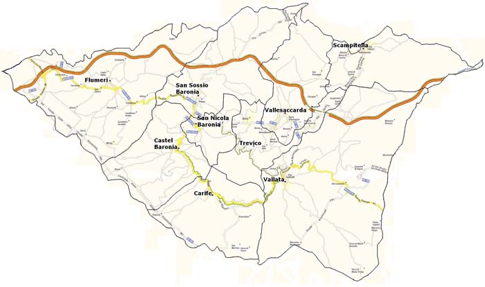 mappa dei paesi della Baronia